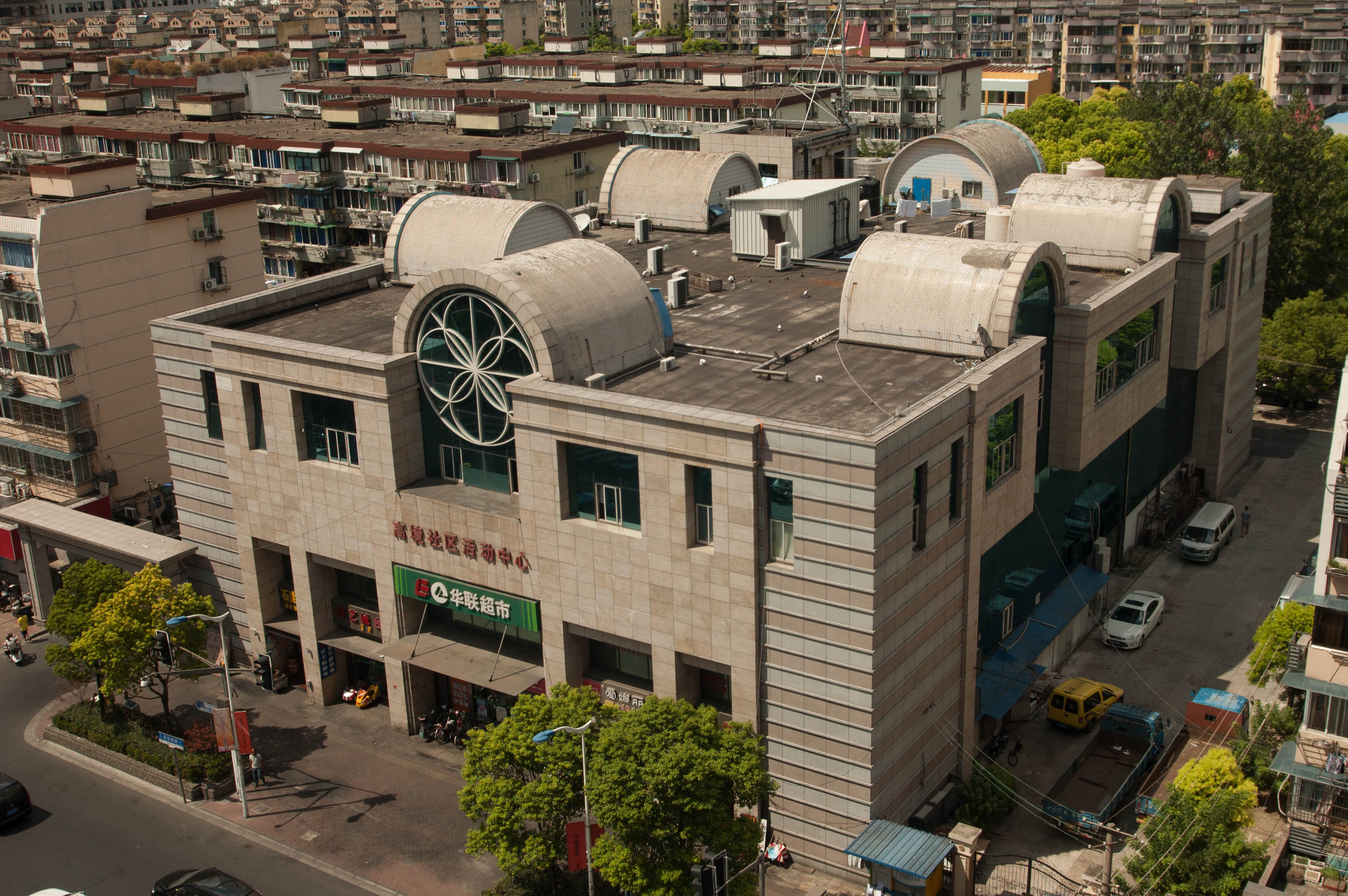 高境社区活动中心全貌